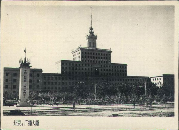 1959年的北京广播大厦。前面立着“大跃进”中的口号：“干劲一鼓再鼓，上游一争再争”。